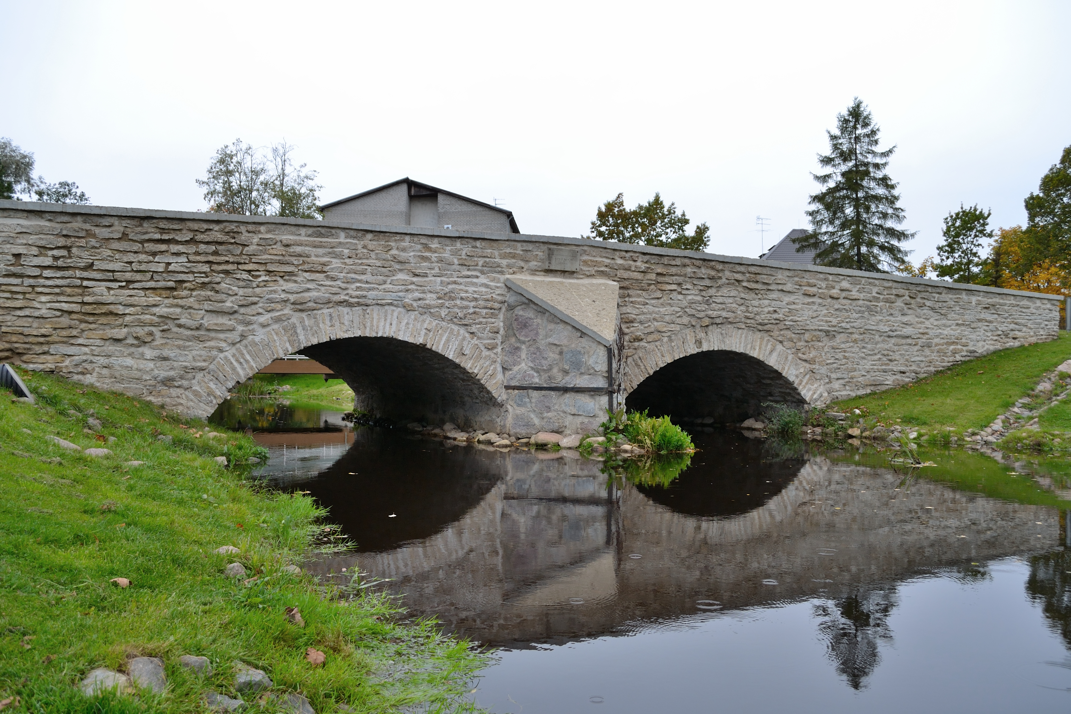 Rapla kivisild